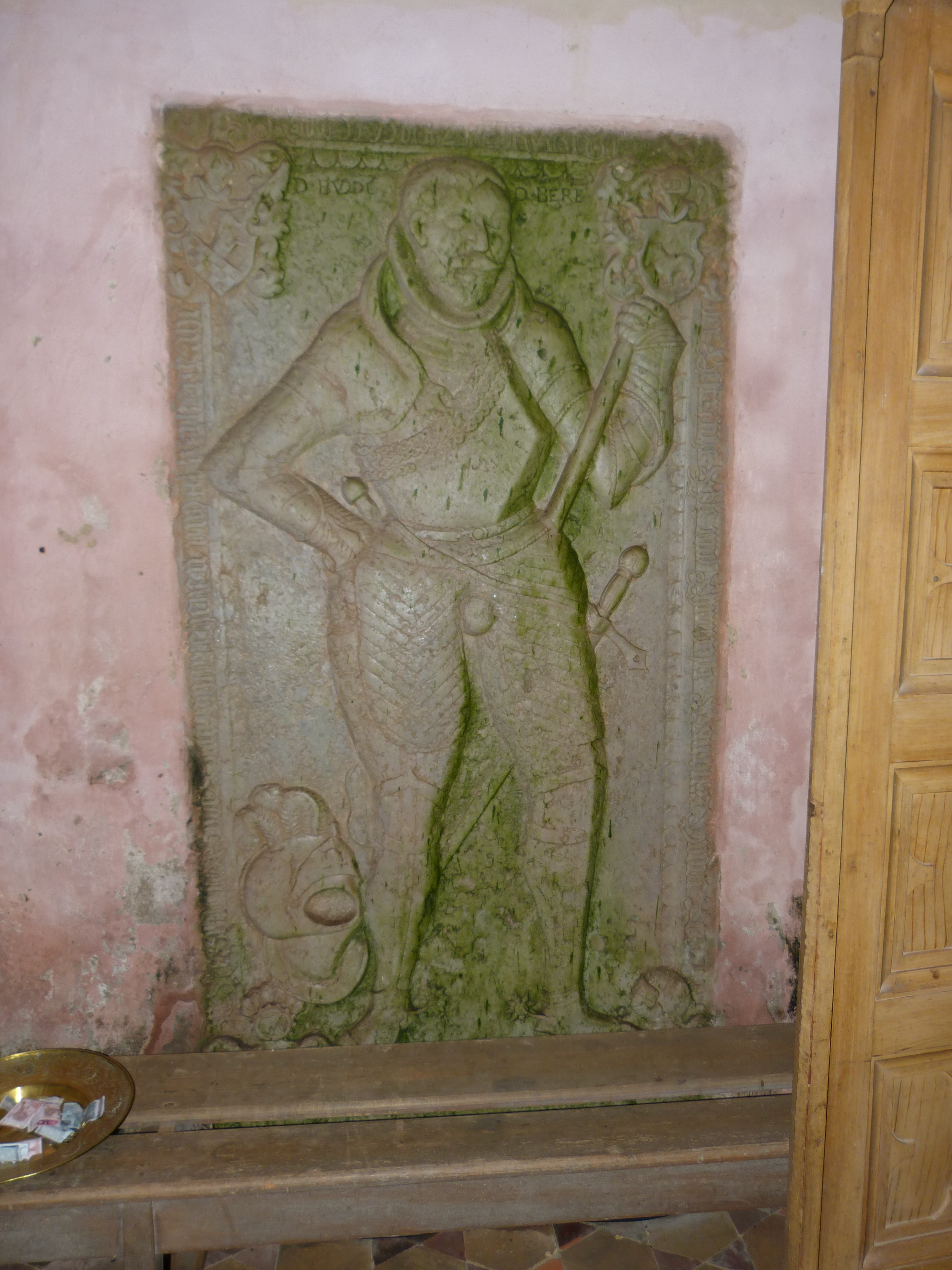 Kirche Gramzow bei Krusenfelde, Grabplatte von Matthias Budde